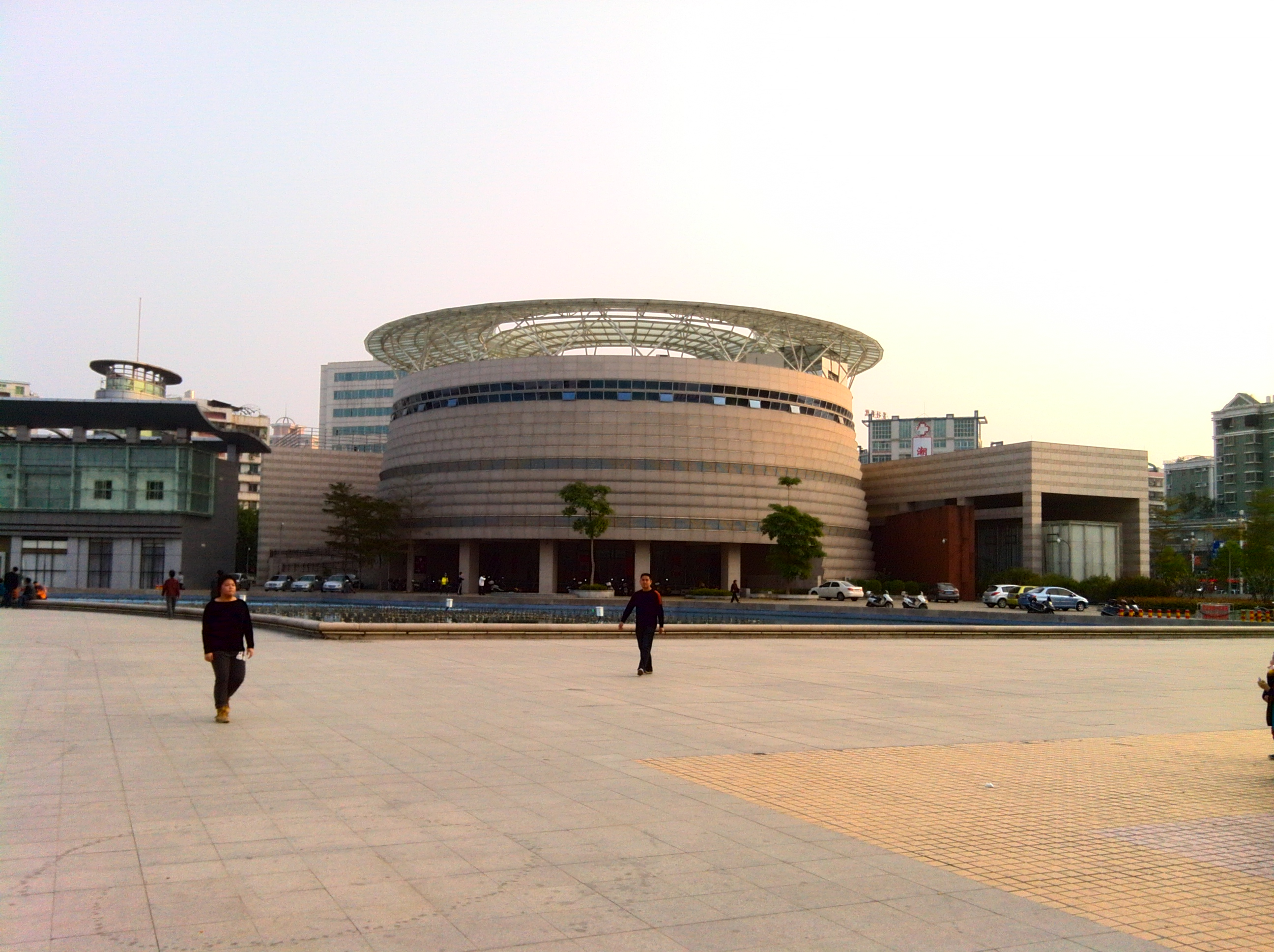 潮州博物馆，位于潮州人民广场西南端。